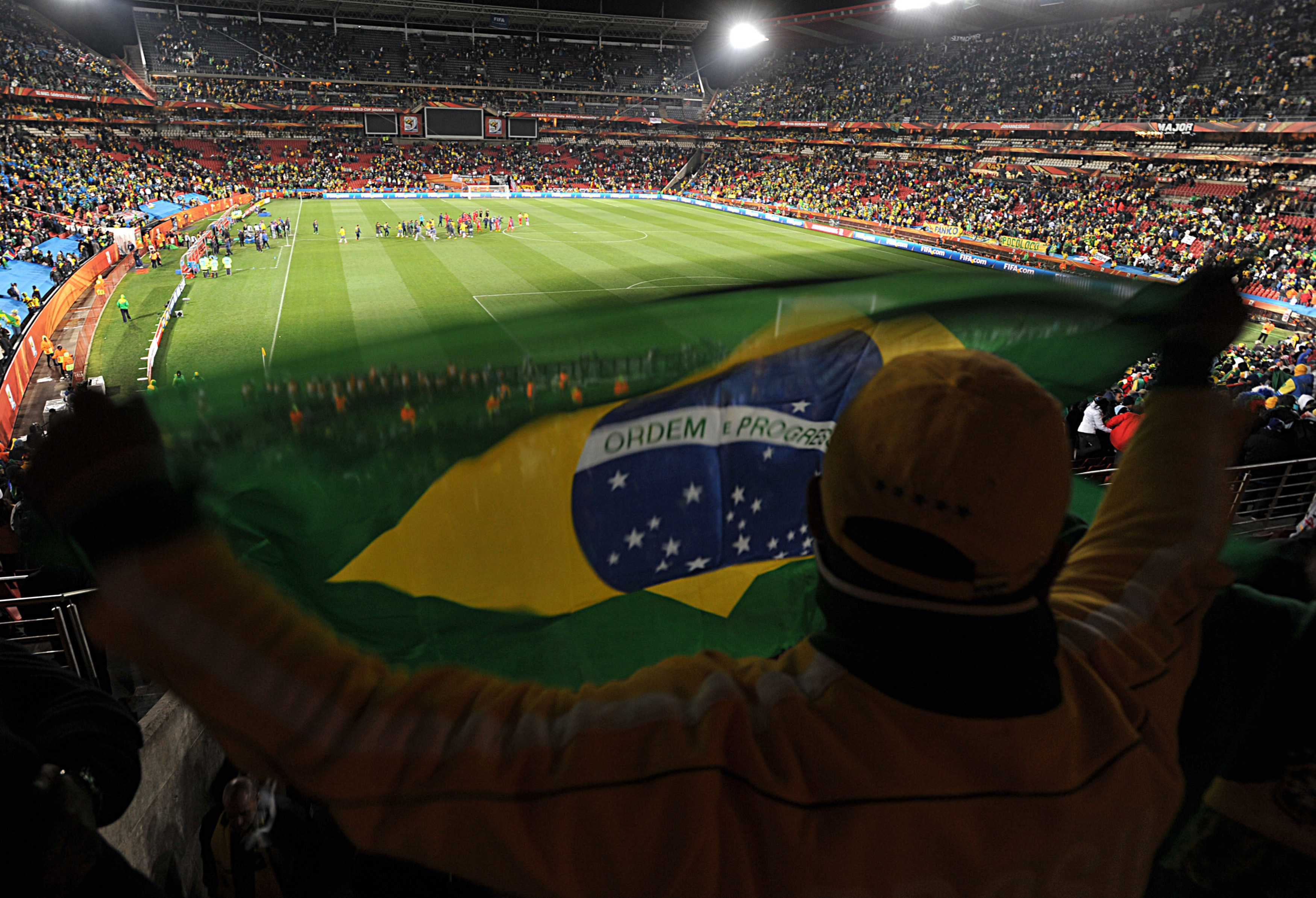 Torcida brasileira comanda a festa na estreia da seleção na Copa do Mundo da África do Sul.